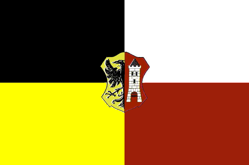 Vlajka města Město Touškov